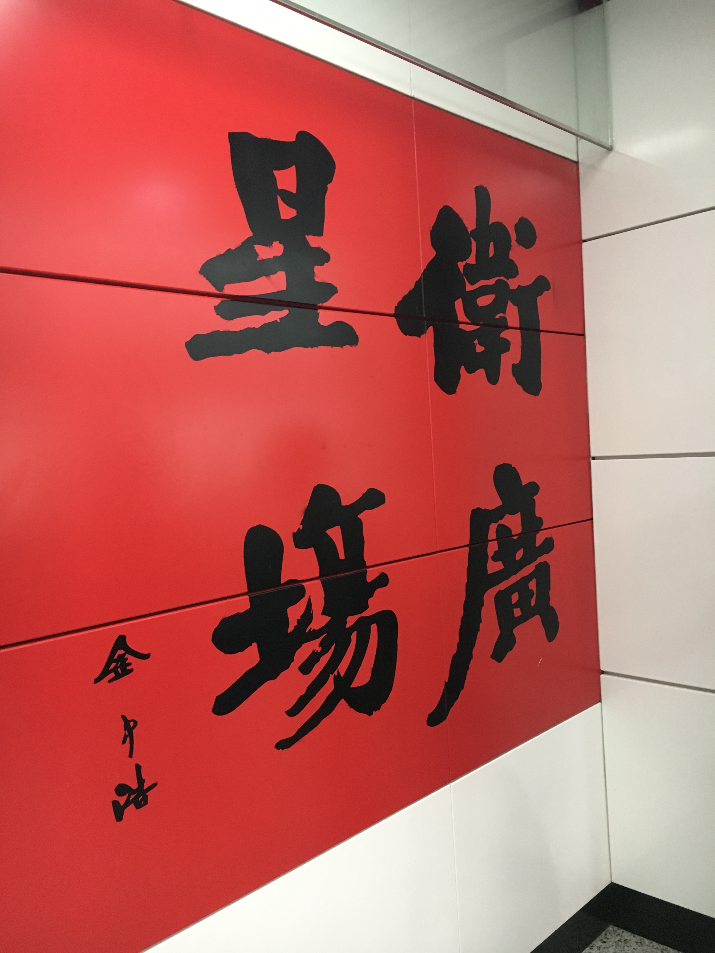 一号线卫星广场站字壁